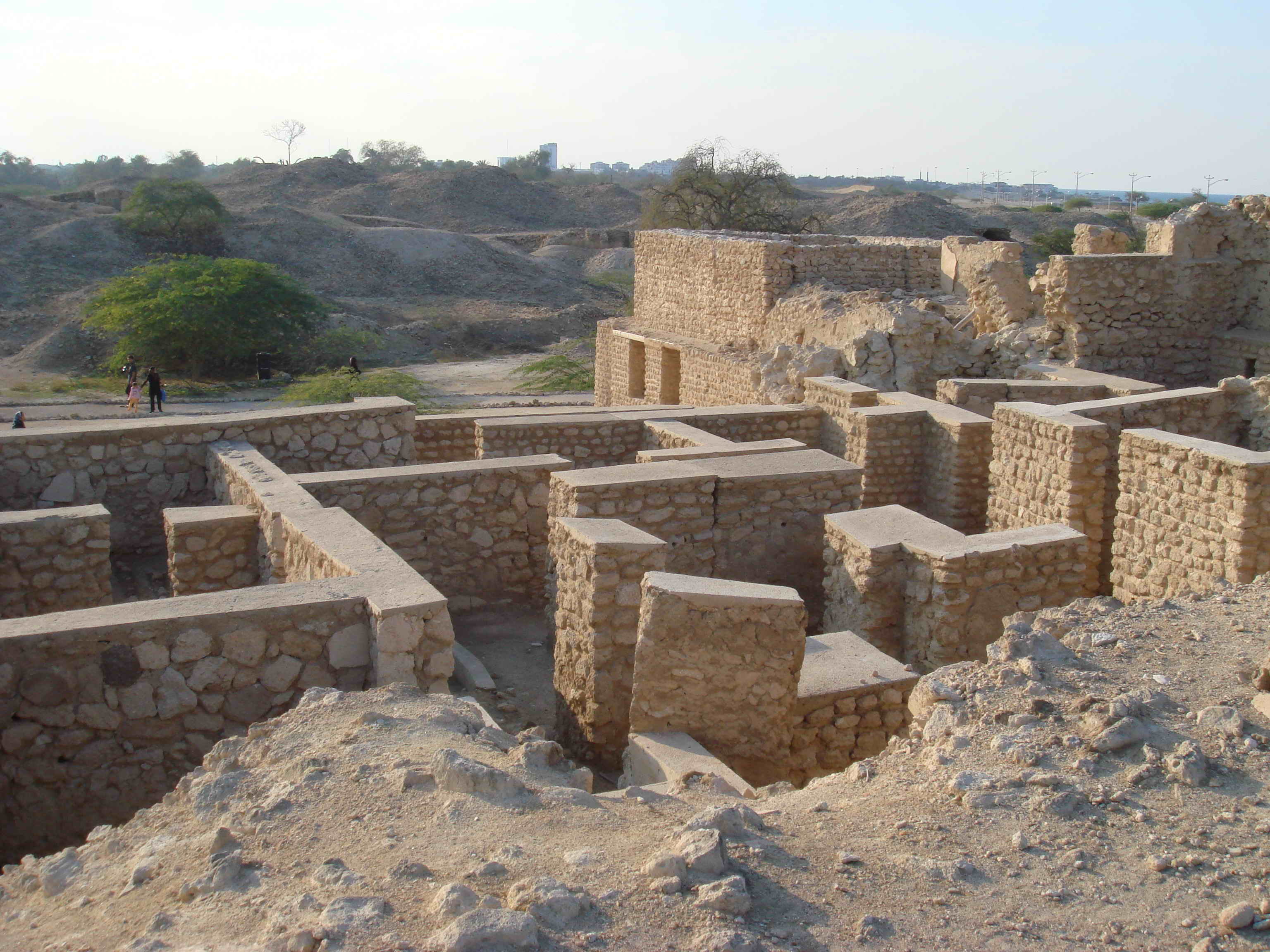 شهر حریره در جزیره کیش. اینجانب ایجاد کننده این تصویر می باشم.